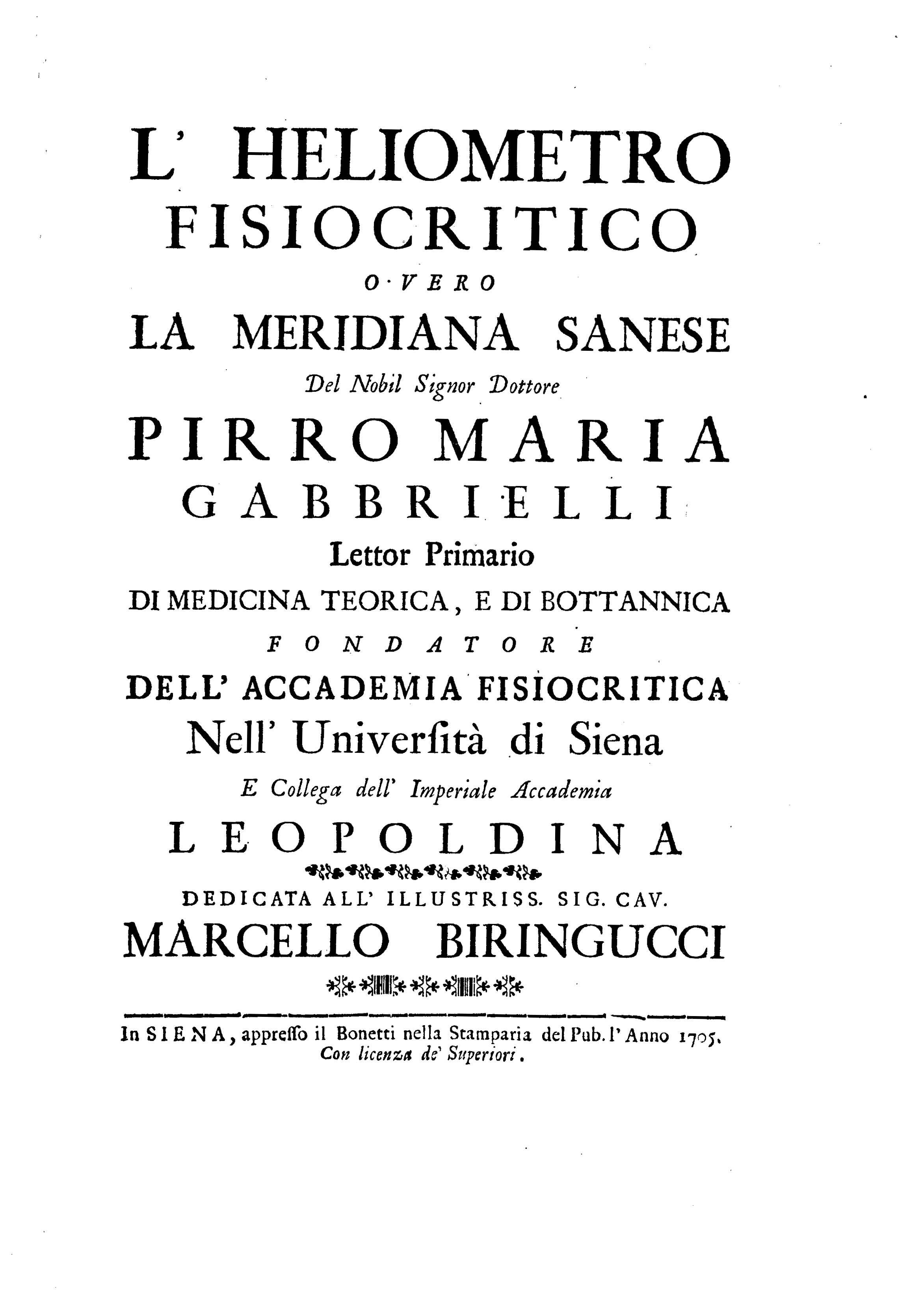 L'heliometro fisiocritico o vero La meridiana sanese del nobil signor dottore Pirro Maria Gabbrielli lettor primario di medicina teorica, e di bottannica fondatore dell'Accademia Fisiocritica nell'Università di Siena e collega dell'Imperiale Accademia Leopoldina. Dedicata all'Illustrissimo Signor Cavaliere Marcello Biringucci. - In Siena : appresso il Bonetti nella Stamparia del pub., 1705. - [12], 144 p., p. 125-140, [44] p. di tav., [3] c. di tav. ripiegate ; 2° .